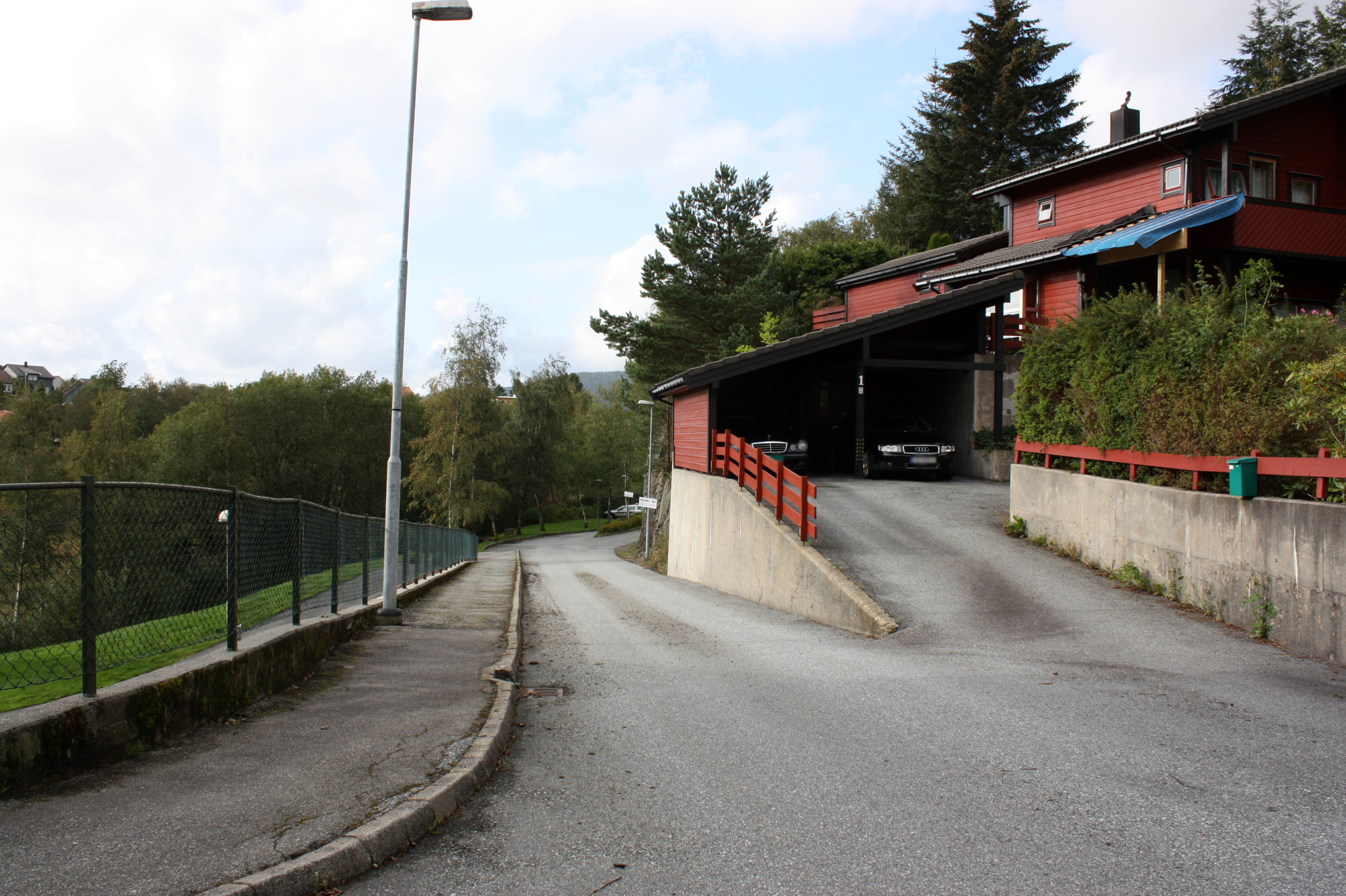 Nesttuntræet, Fana, Bergen.